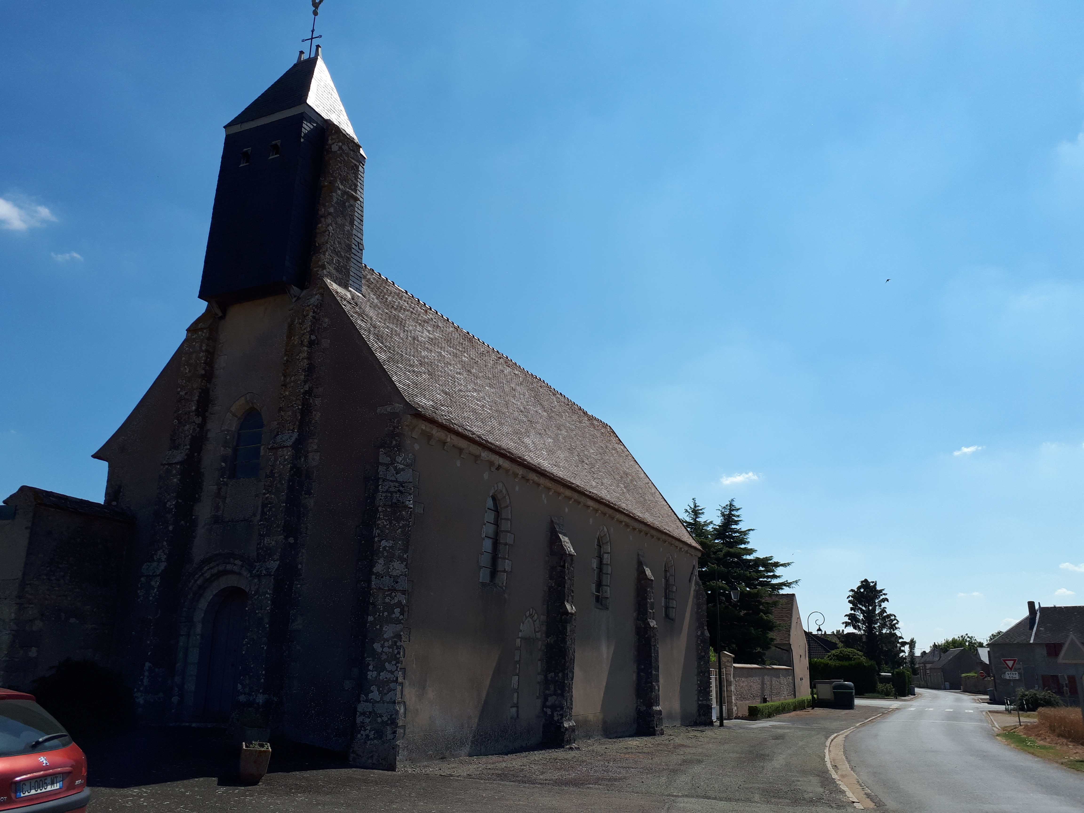 Église d'Ardelu.